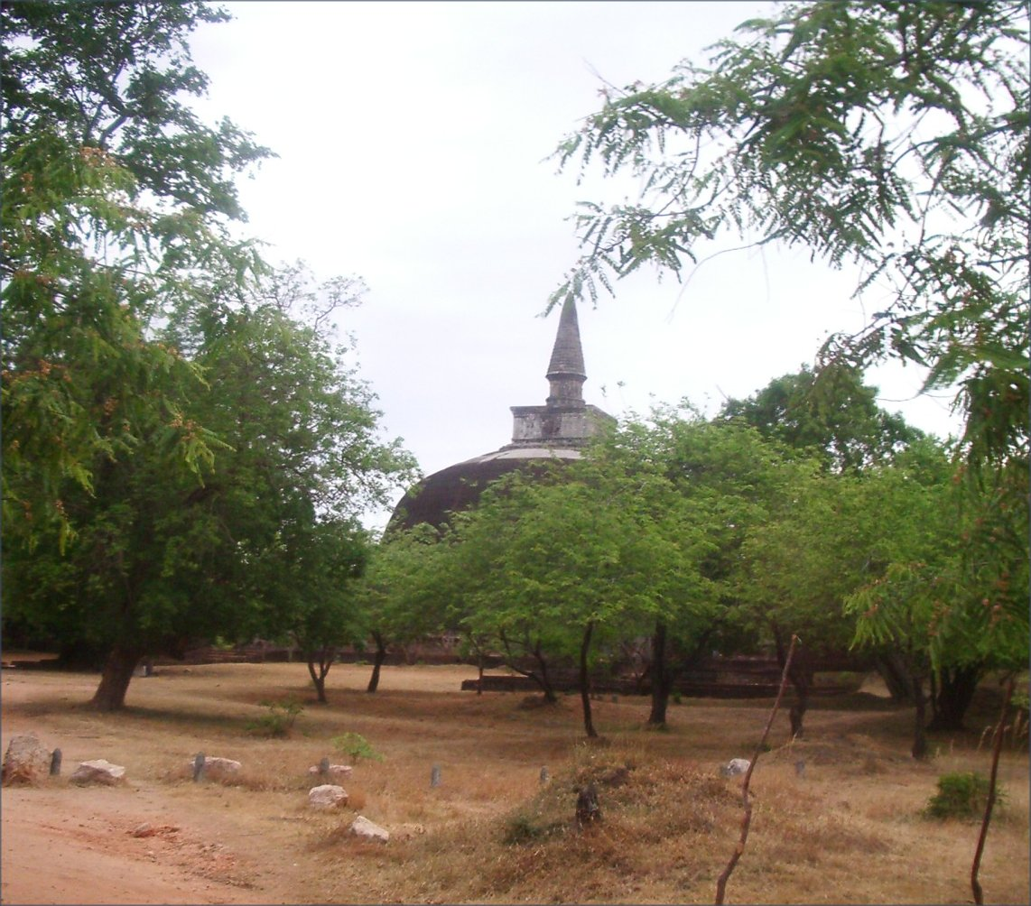 Gal Vihara a Polonnaruwa, foto feta per J. Ollé el juliol del 2006 සිංහල: ගල් විහාරය, පොළොන්නරුව